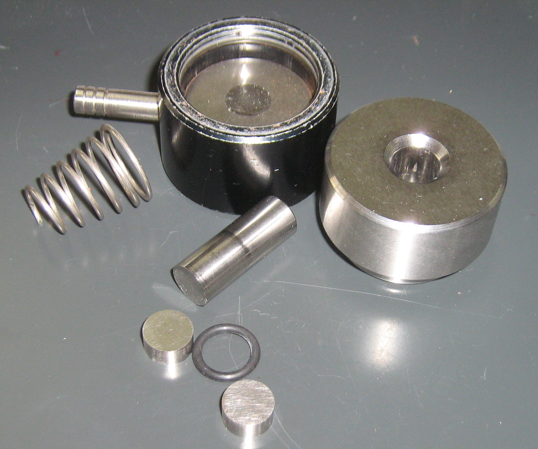 Presswerkzeug zur Herstellung von Kaliumbromid-Tabletten für die Infrarotspektroskopie (Einzelteile)